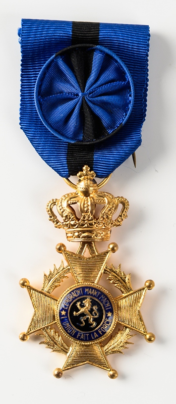 Alfons De Ceulaerde was de schoonvader van Johanna Van Dingenen. Alfons ging nog vele jaren met zijn schoondochter en zijn zoon naar de herdenkingen in Brussel. Alfons was soldaat gedurende vier jaar. Hij was in zijn laatste maand legerdienst bij het begin van de oorlog in 1914. Alfons mocht dus niet afzwaaien. Hij werd getroffen door een kogel in de buik. Alfons werd overgebracht naar Brighton. Van zodra hij genzezen was moest hij terug naar het front. Zijn vrouw kwam hem opzoeken met hun kind dat toen één jaar was. Zijn vrouw sprak geen Engels. Met dit bezoek waren de ouders niet akkoord maar zij is toch gegaan omdat haar zuster haar wou vergezellen. Toen zij in Engeland waren moesten ze blijven tot de oorlog voorbij was. Alfons vertelde veel over de oorlog; over gevechten van man tegen man, enz.. Hij was een kleine man en was heel fier op zijn prestaties. Alfons stond bij de Brabançonne steeds fier recht. Hij werd bevangen door gas aan het front en moest hierdoor altijd heel zwaar hoesten.